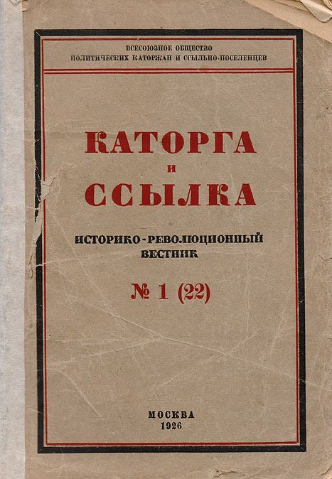 ajaloolis-revolutsiooniline teatmik